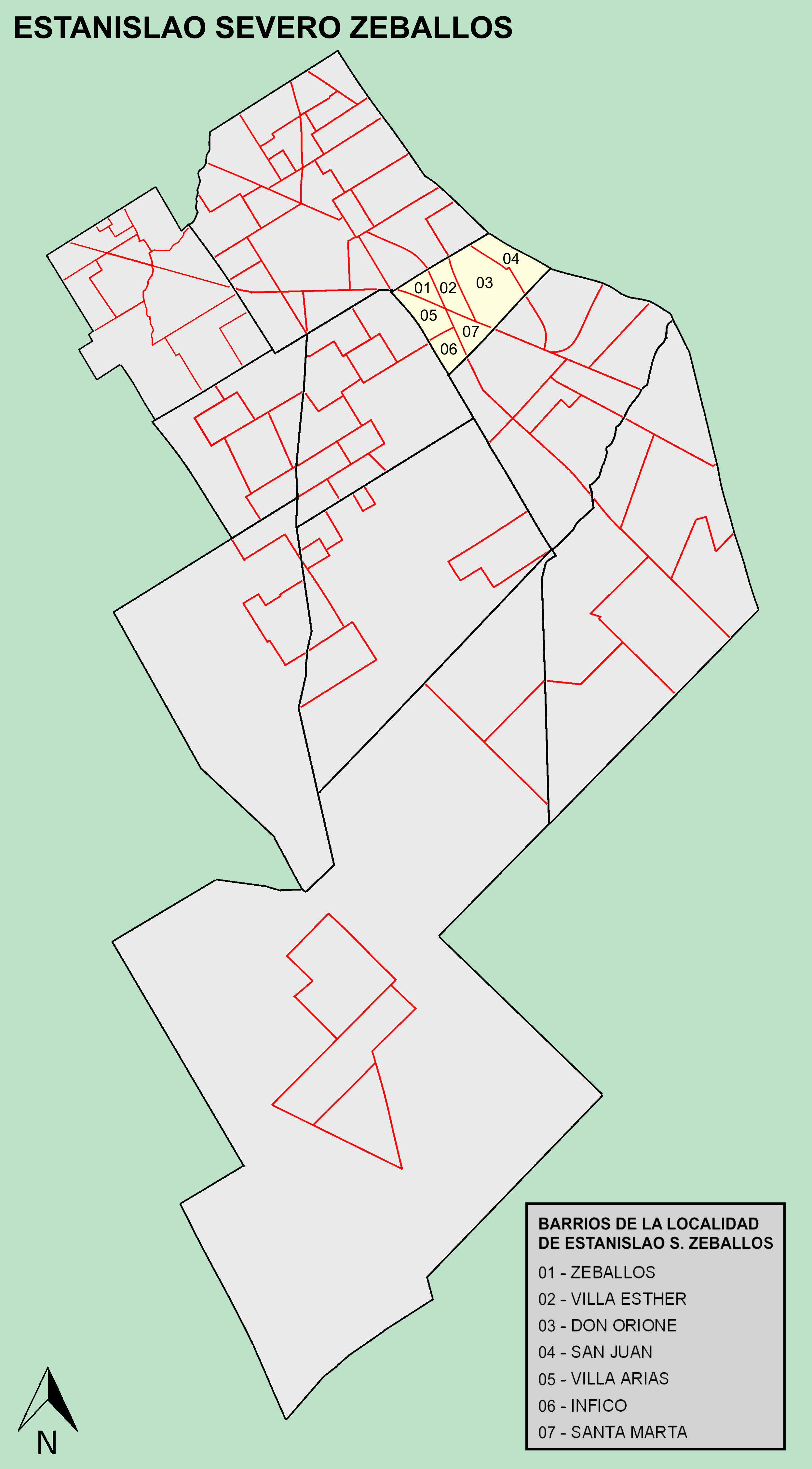 Mapa barrios de Estanislao Zeballos